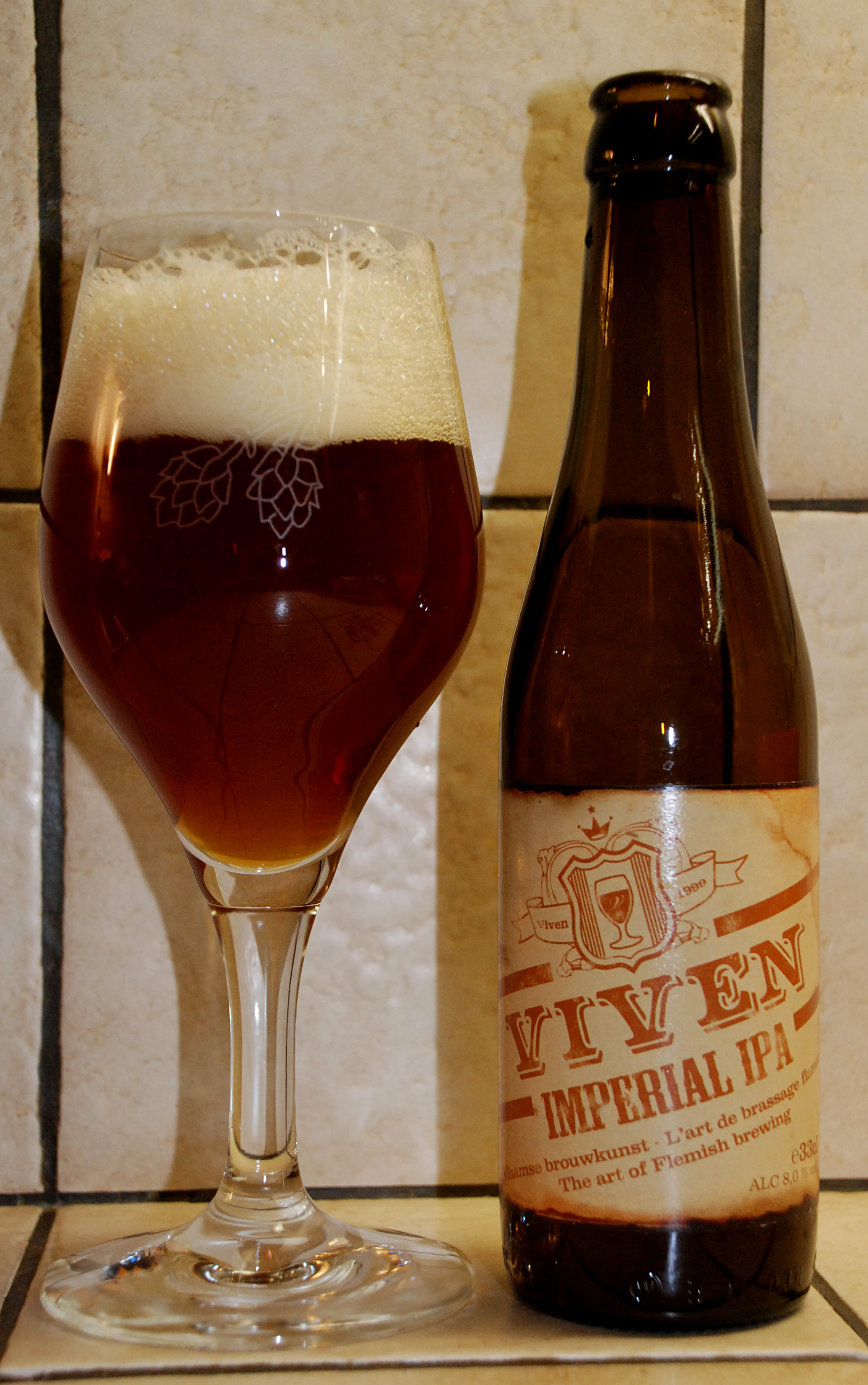 Viven Imperial IPA